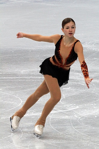 Моника Симанчикова (Словакия) на чемпионате мира по фигурному катанию среди юниоров 2012